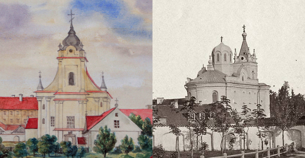 Беларуская (тарашкевіца): Маскалізацыя (русіфікацыя) Вялікага Княства Літоўскага. Места Горадня. Касьцёл бэрнардынак, помнік архітэктуры барока: аўтэнтычны выгляд (налева) і па частковым руйнаваньні ў выніку маскоўскай перабудовы (направа)